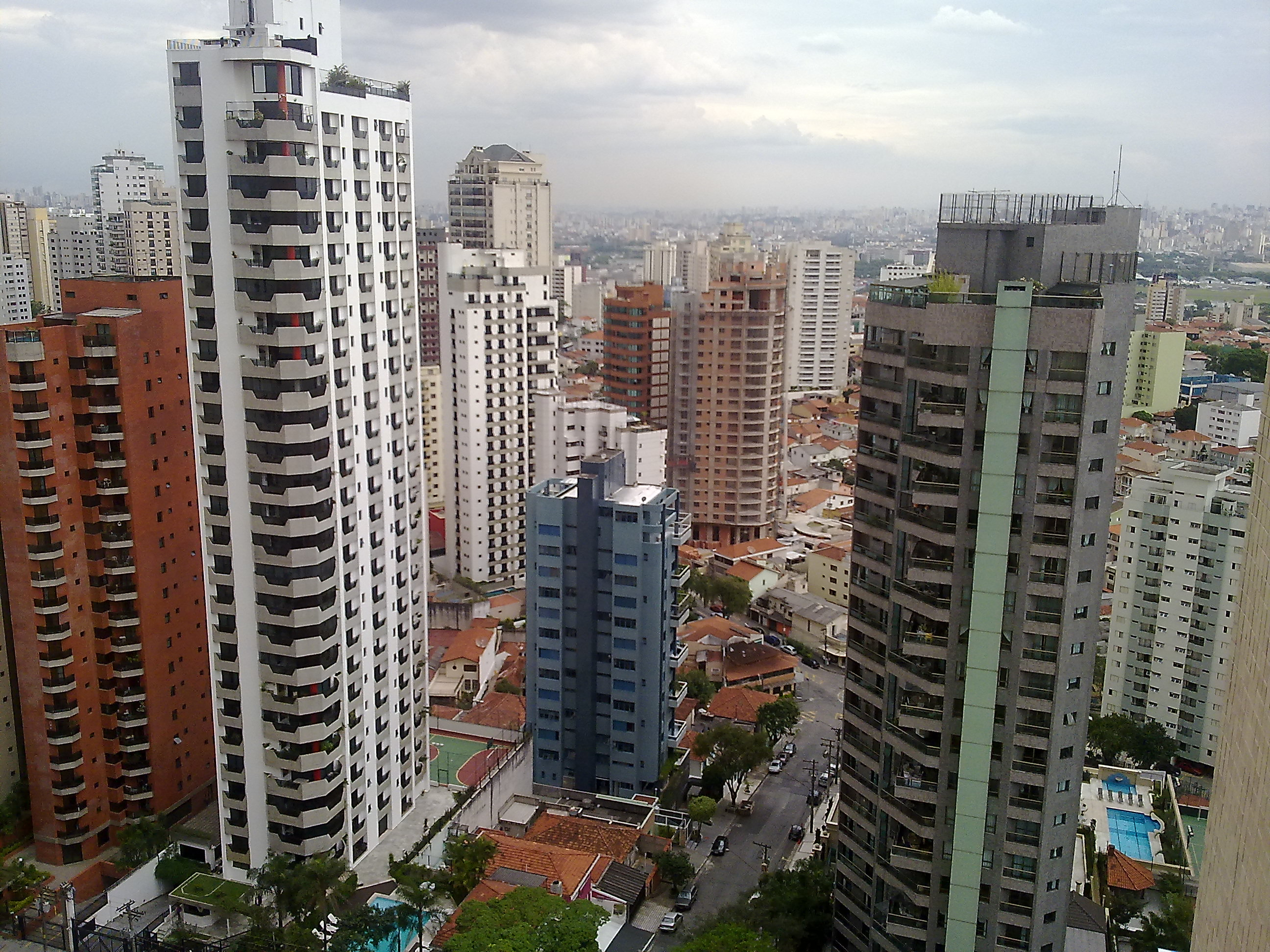 Foto dos edifícios da região do Alto de Santana, zona norte de São Paulo/SP Brasil